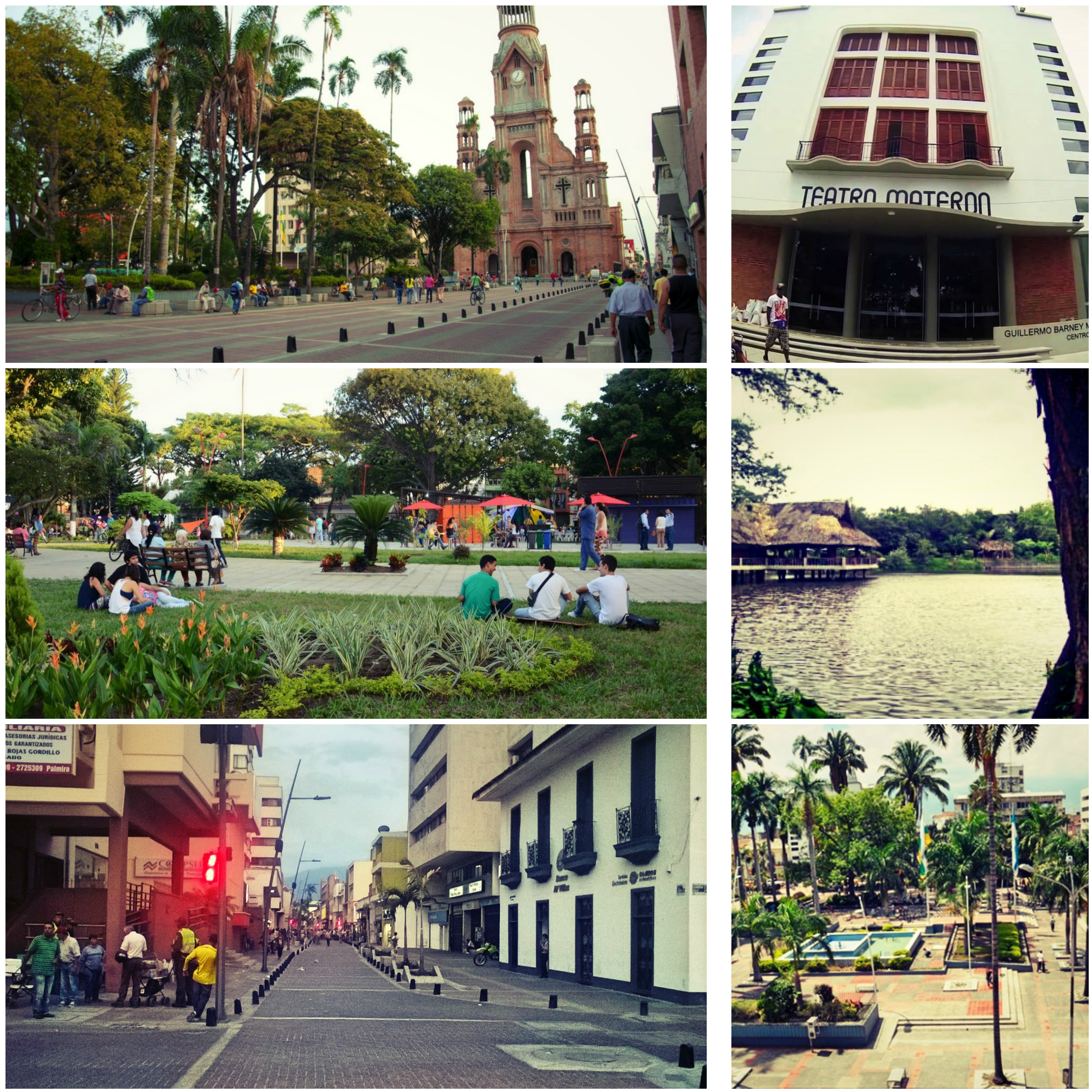 Palmira